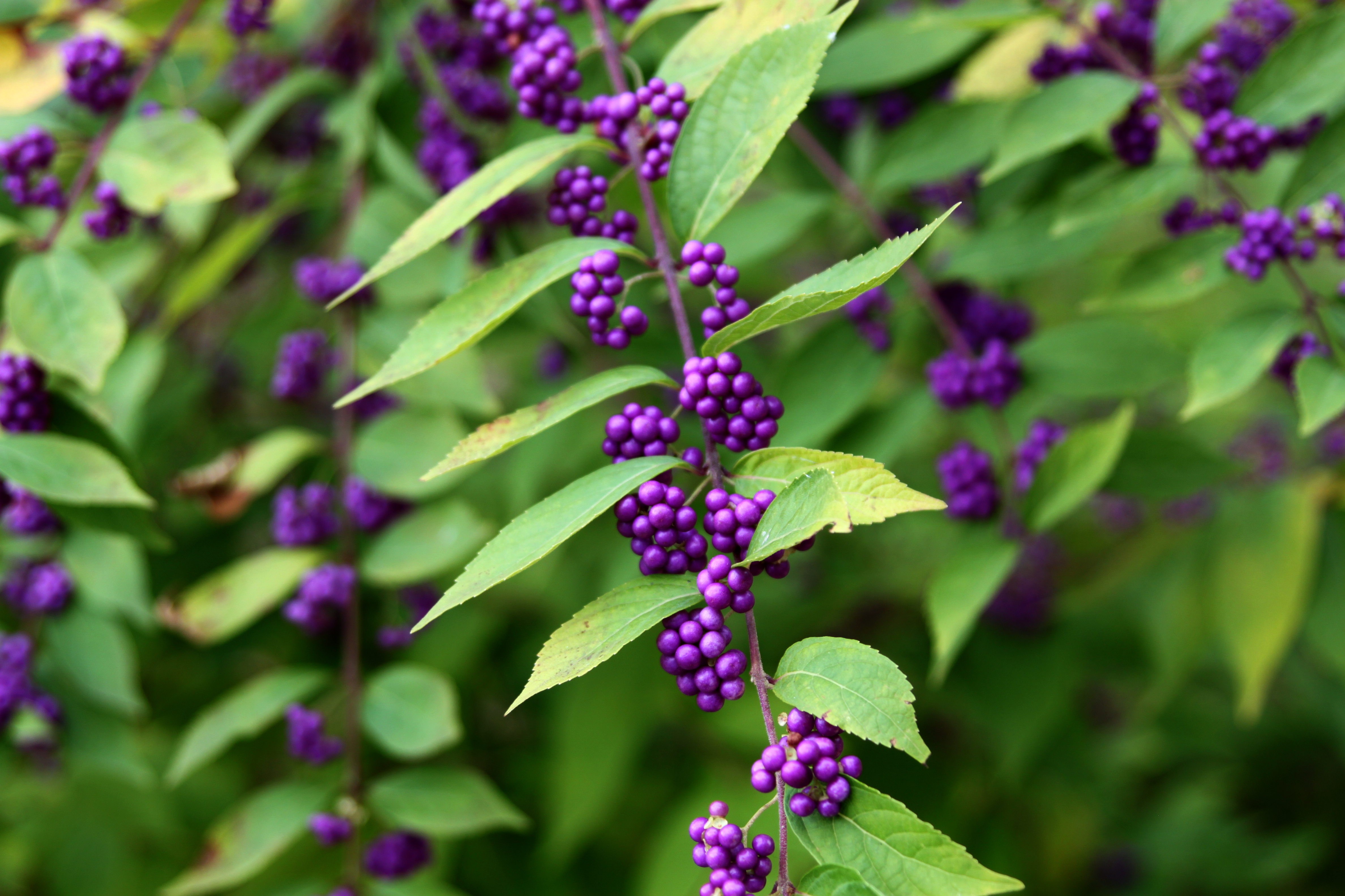 Callicarpa americana